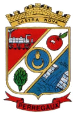 logo de la ville de Mohammadia W Mascara Algérie